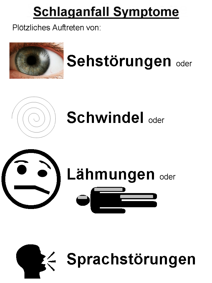 Erkennungszeichen Symptome Hirninfarkt